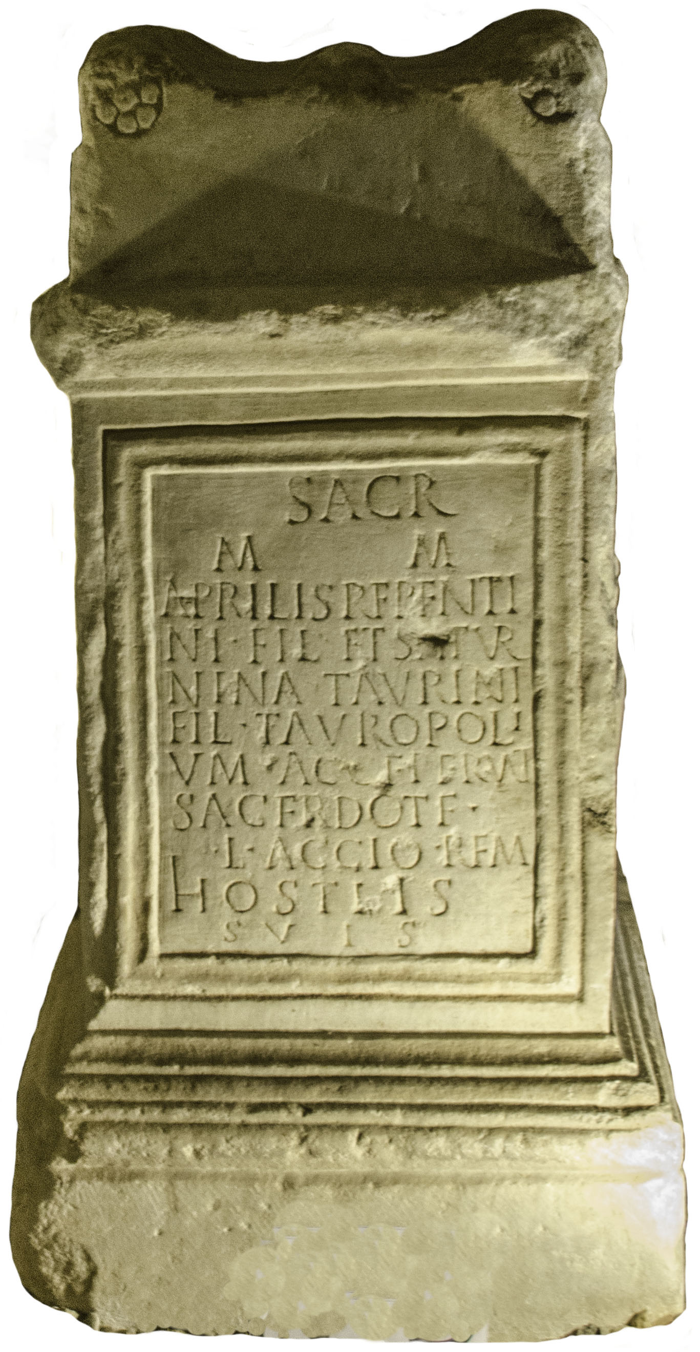 Autel taurobolique de Aprilis et Saturnina. Musée Eugène-Camoreyt de Lectoure, Gers, France.